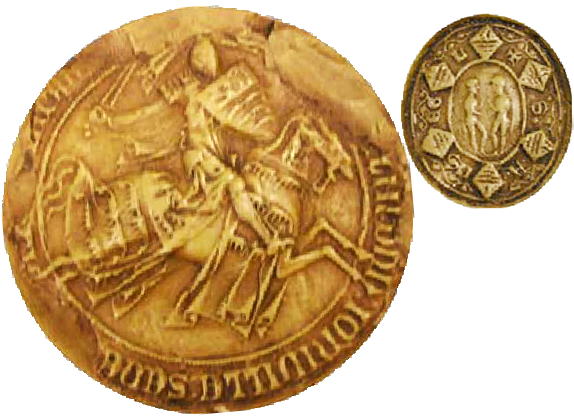 cf le titre.